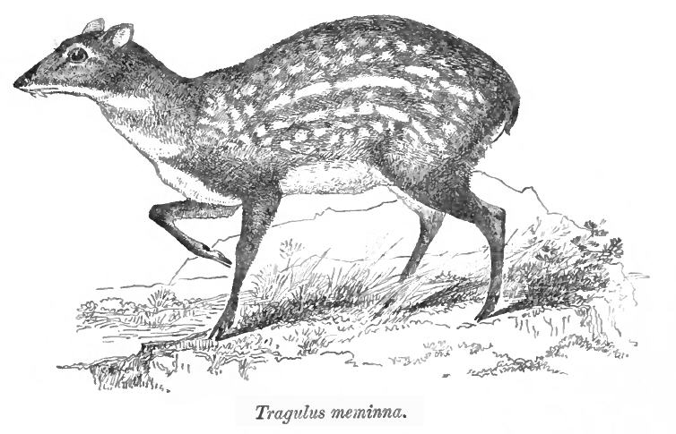 Tragulus meminna = Moschiola sp.